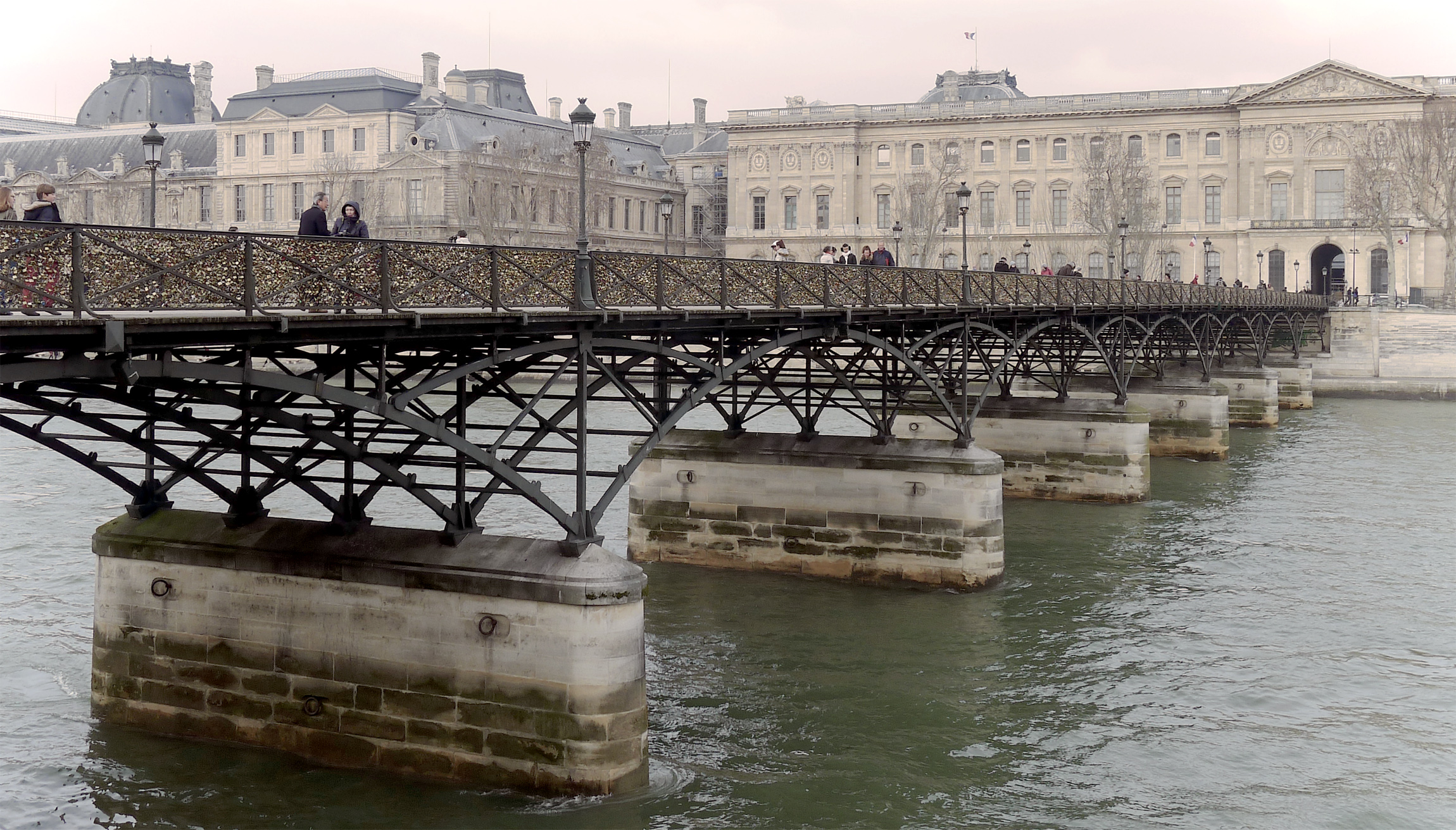 Pont des Arts avec en arrière-plan le palais du Louvre - Paris Ier et VI .